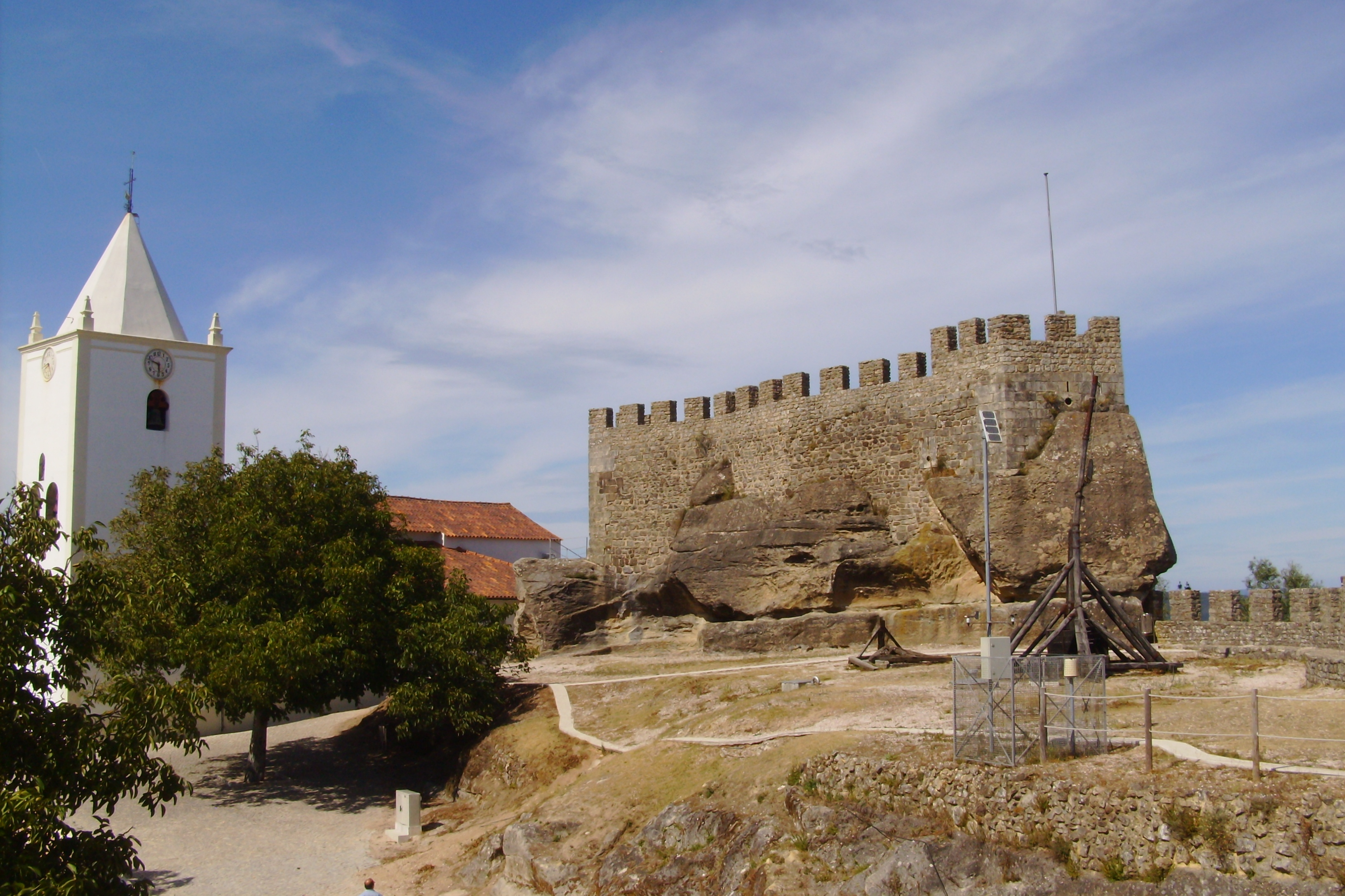 Castelo de Penela, freguesia de Santa Eufémia, concelho de Penela, distrito de Coimbra, Portugal: Castelejo.